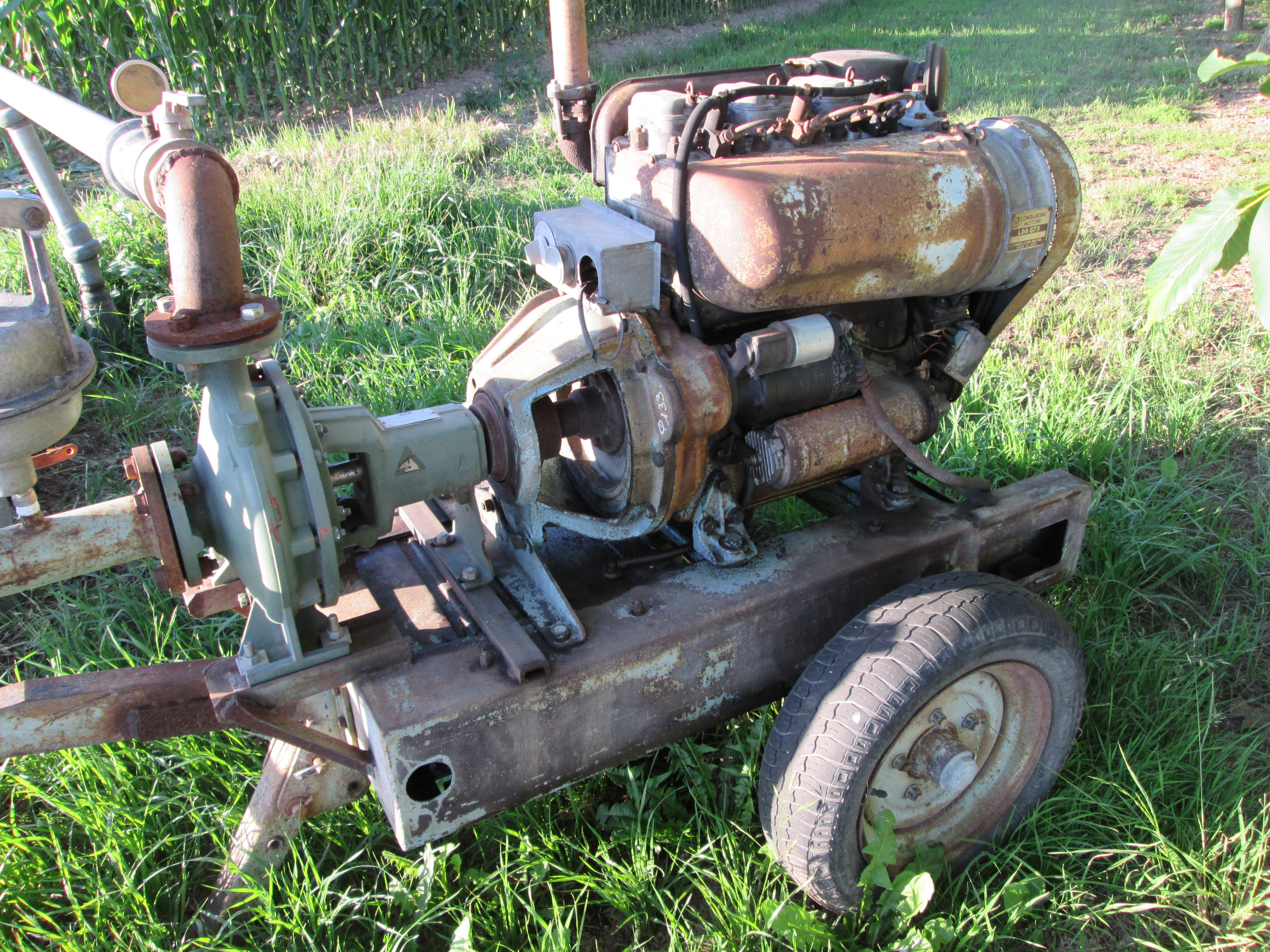 Motopompe d'irrigation Lombardini Motori LDA 673 en bordure d'un champ de maïs, près de Neuvic (Dordogne, France). L'eau provient d'un puits à proximité de la motopompe (voir photos) ; la rivière Isle se trouve à quelques centaines de mètres.